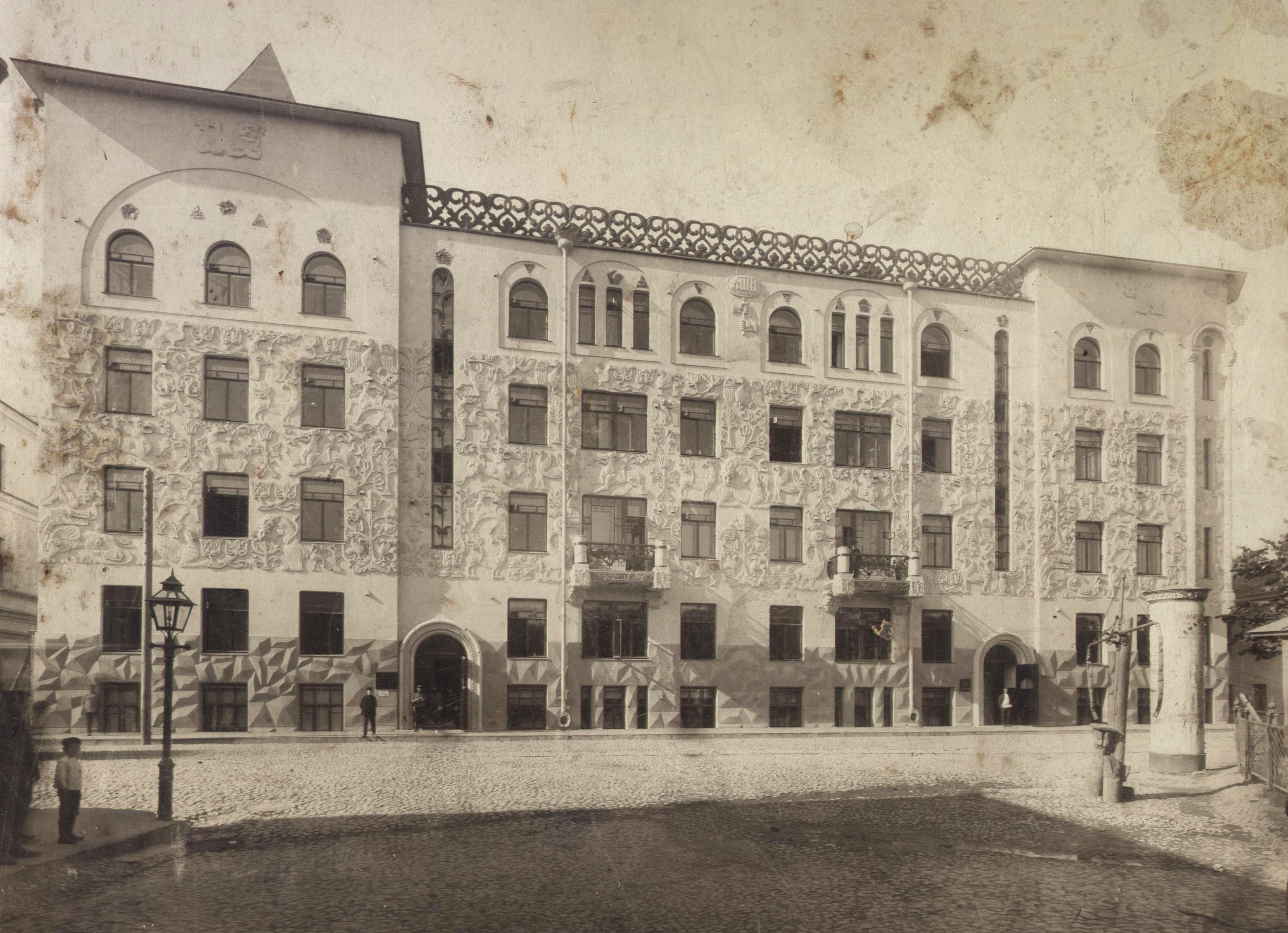 Дом со зверями - доходный дом церкви св. Троицы Живоначальной, что на Грязех